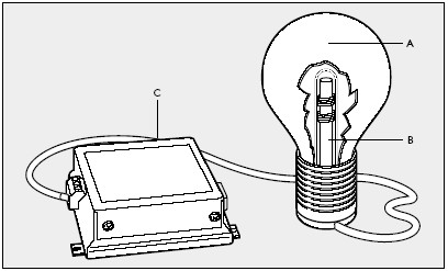 Principe schets Philips inductie-verlichtingssysteem Ticket#2007011510030362